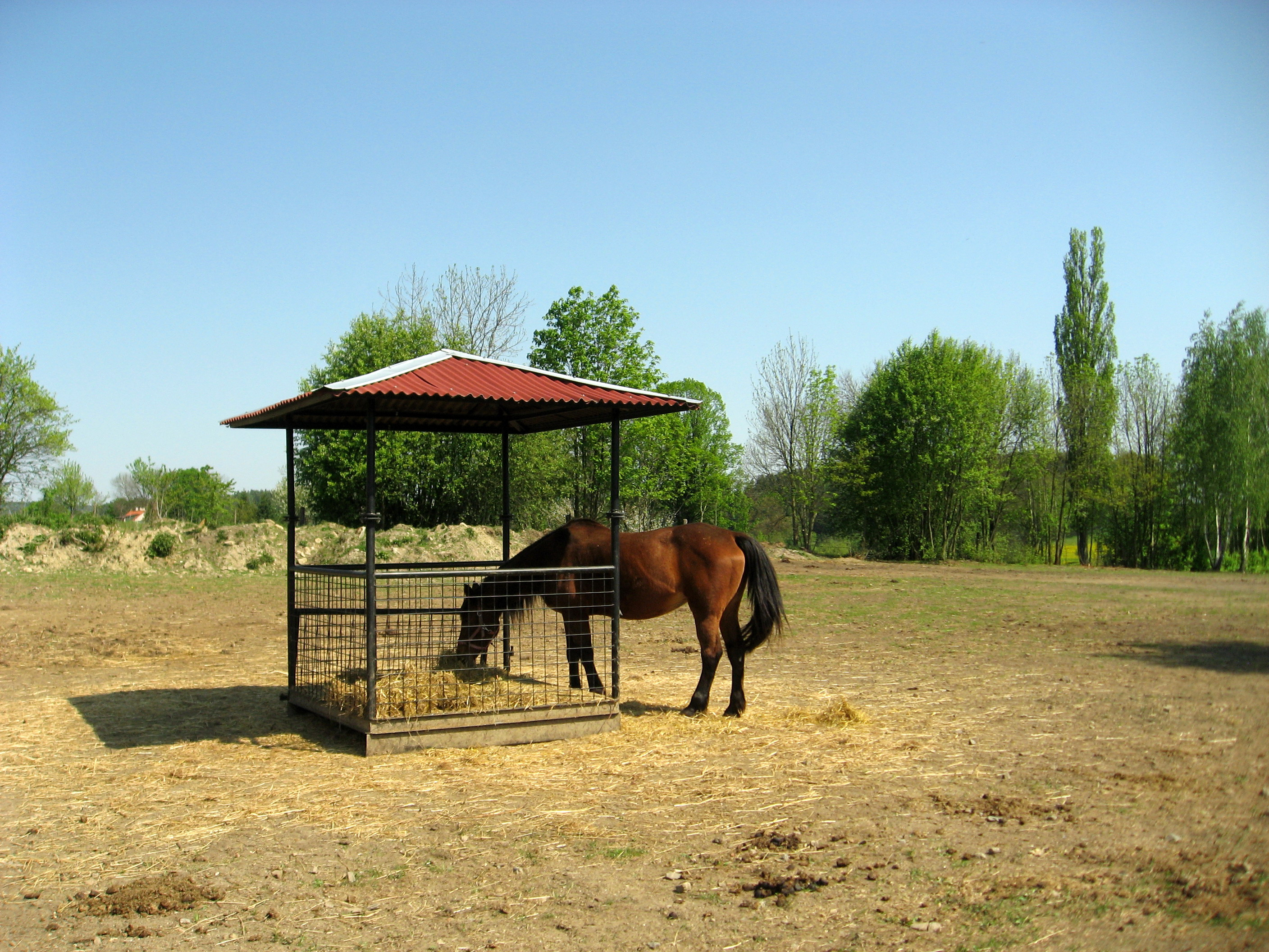 Koně v Boňkově